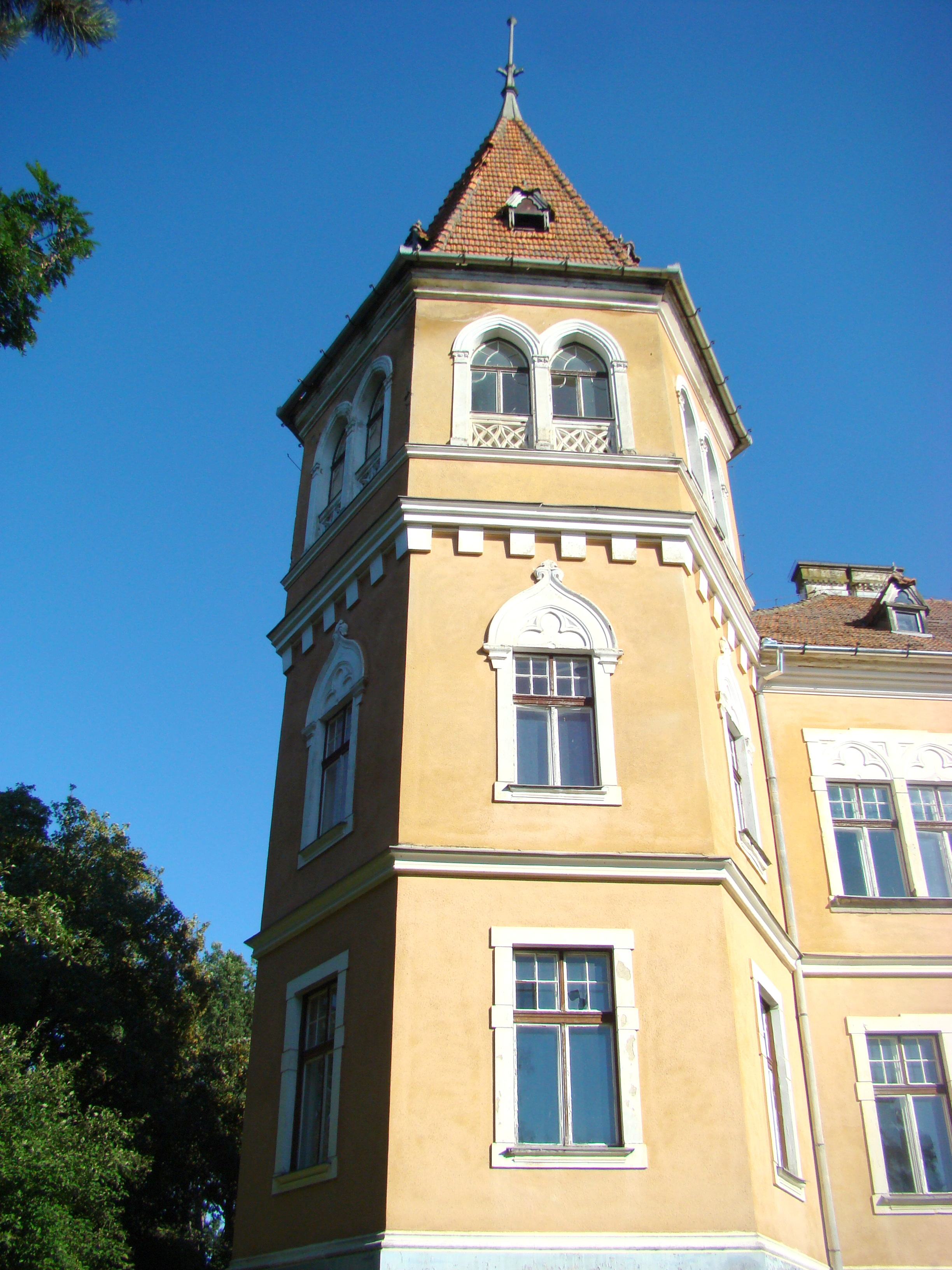 Castelul Ugron, sat Zau de Câmpie; comuna Zau de Câmpie 01